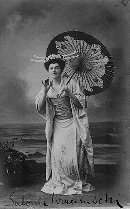 С. Крушельницкая в роли Чио-Чио-Сан в опере Д. Пуччини «Мадам Баттерфляй»